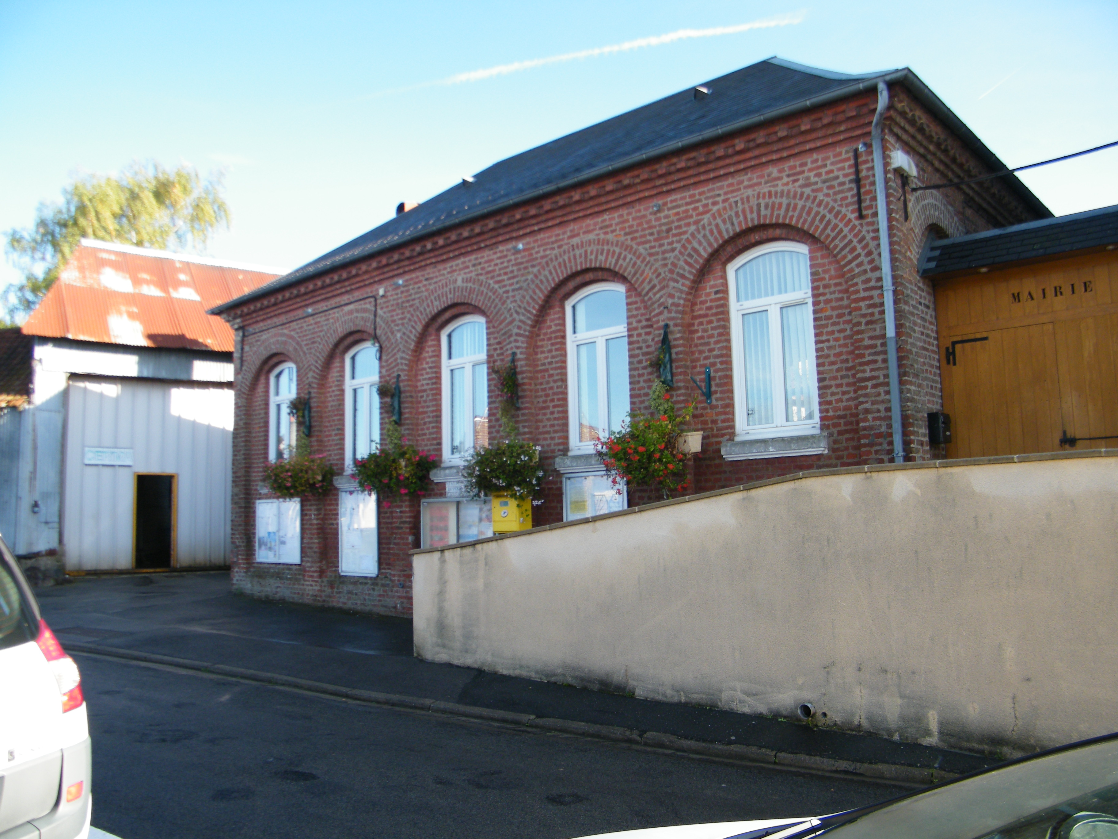 Mairie.